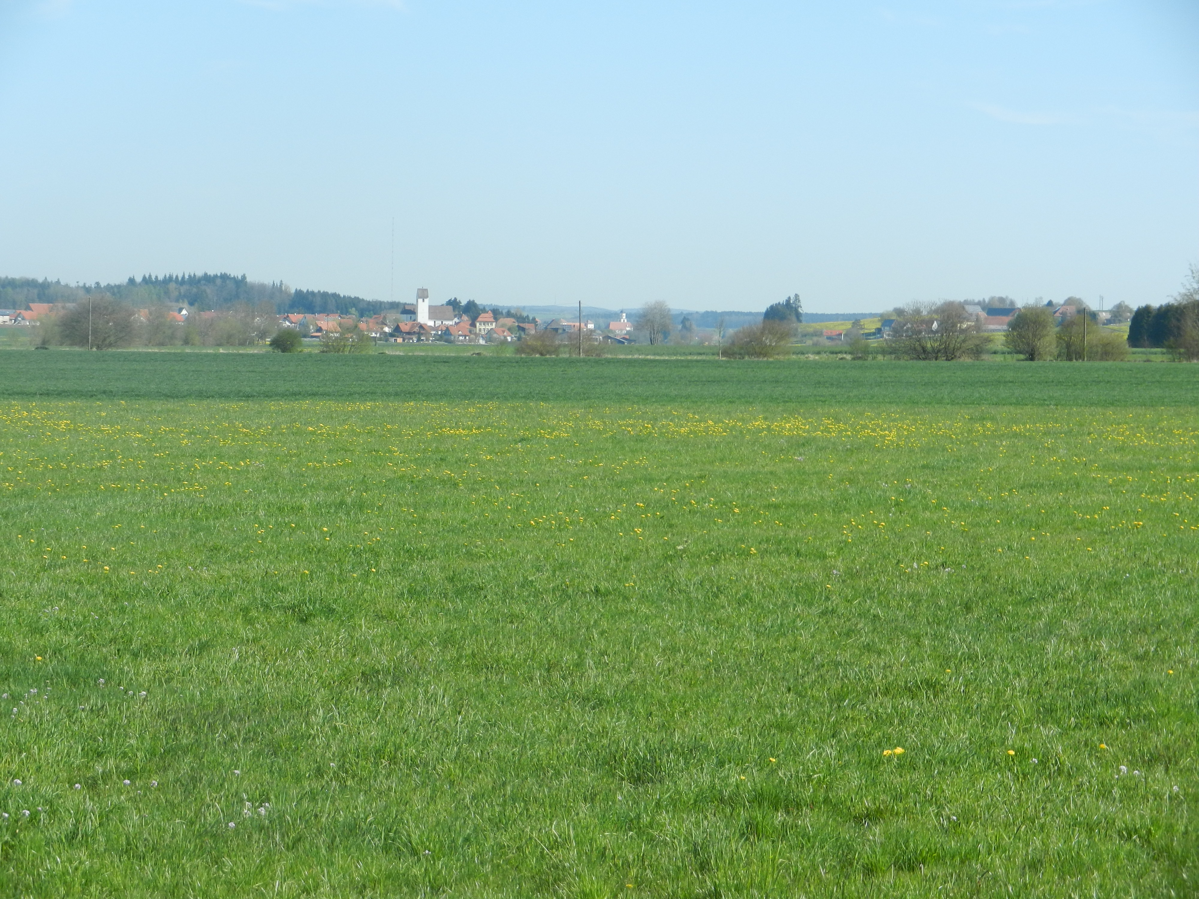 Ablachtal mit Bichtlingen auf der Höhe von Sauldorf, ganz im Hintergrund Schloss und St.-Martins-Kirche in Meßkirch